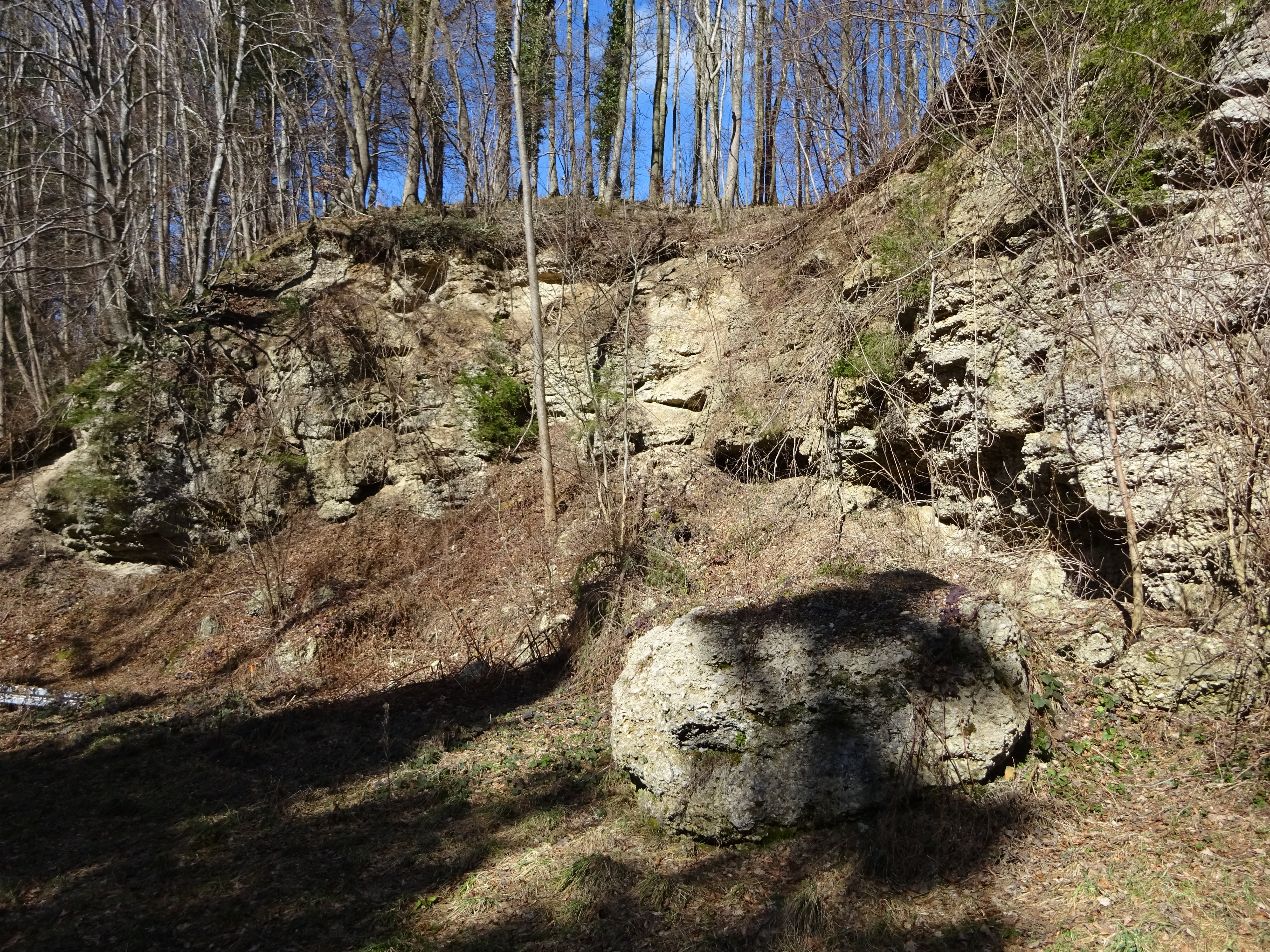 Geotop 778A002 – Wolfertschwender Steige – Landkreis Unterallgäu, Bayern